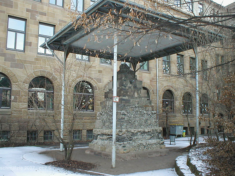 Geologiepyramide im Hof der Dammrealschule in Heilbronn